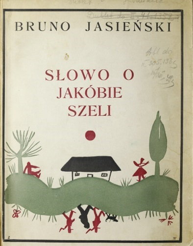 Bruno Jasieński, "Słowo o Jakubie Szeli", okładka proj. Zygmunt Waliszewski. Paryż 1926